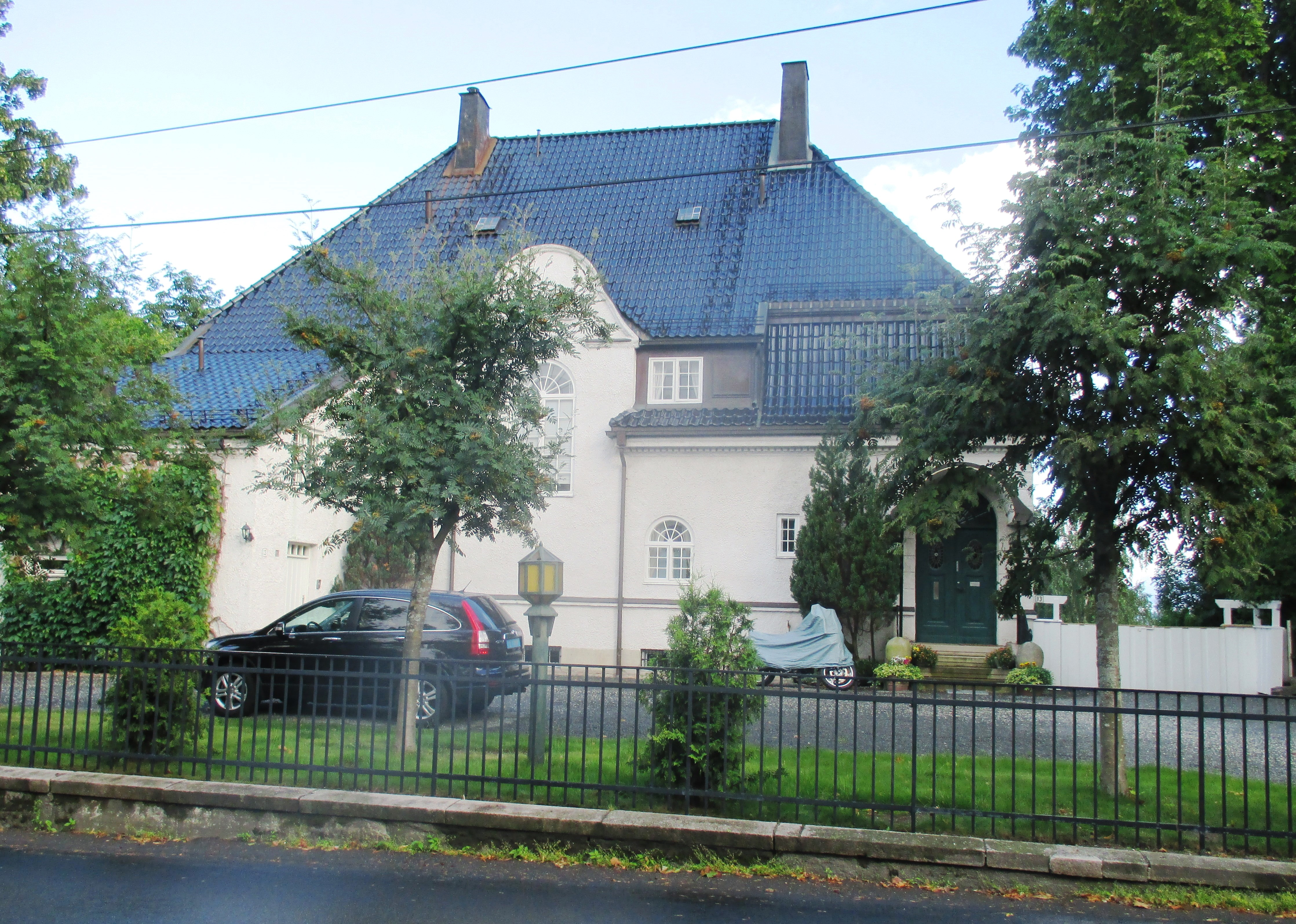 Bygdøynesveien 13, Oslo. Villa (ark. Ekman, Scmith & Michalsen) oppført 1916. Sveits' ambassade holdt hus her fra 2014 til 2017.